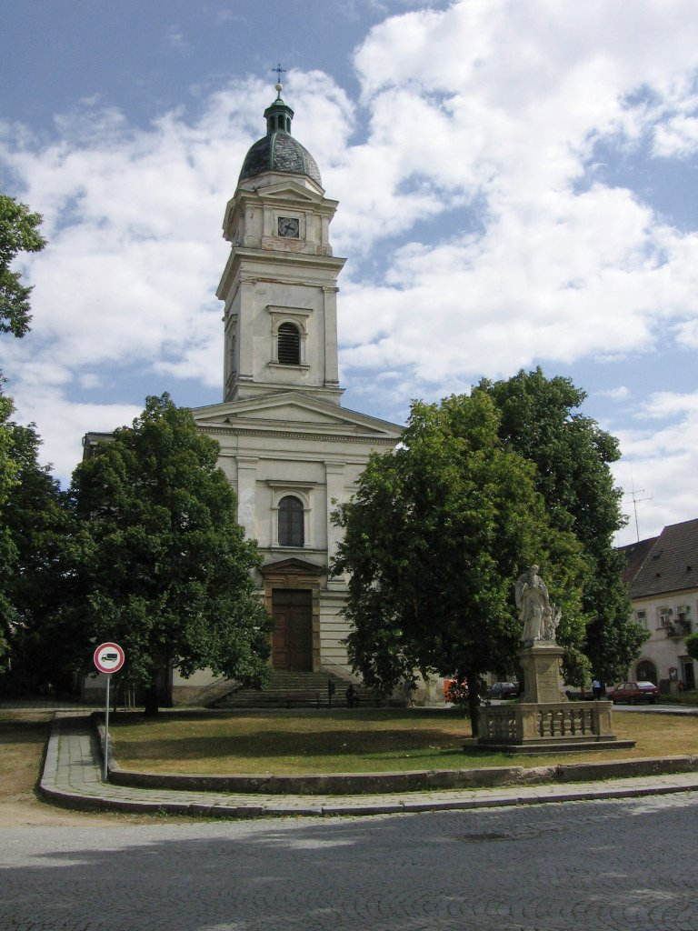 Katolický kostel sv. Petra a Pavla na Masarykově náměstí v Dolních Kounicích. Před ním stojí socha sv. Jana Nepomuckého. Catholic church of St. Peter and Paul in Masaryk square in Dolní Kounice. There is statue of St. John of Nepomuk before it.